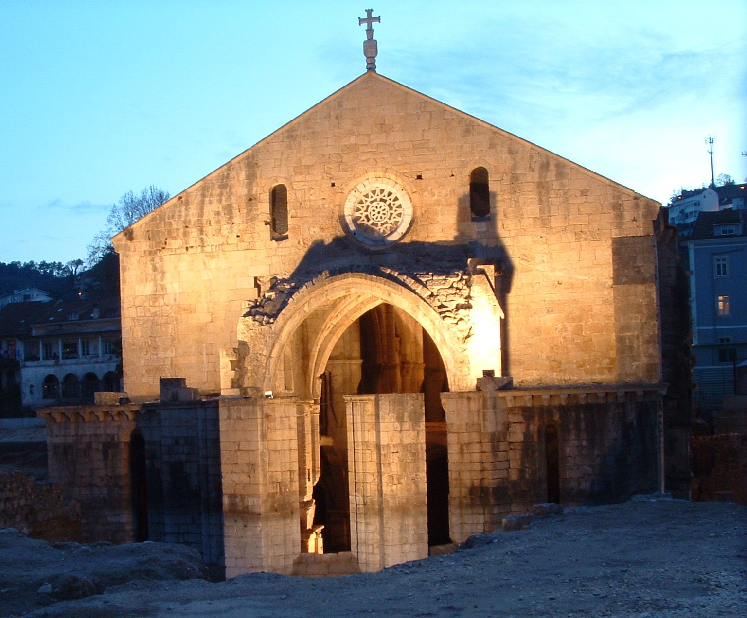 Mosteiro de Santa Clara-a-Velha